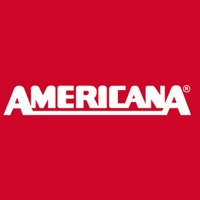 Logo der Freizeit- und Westernreitmesse Americana